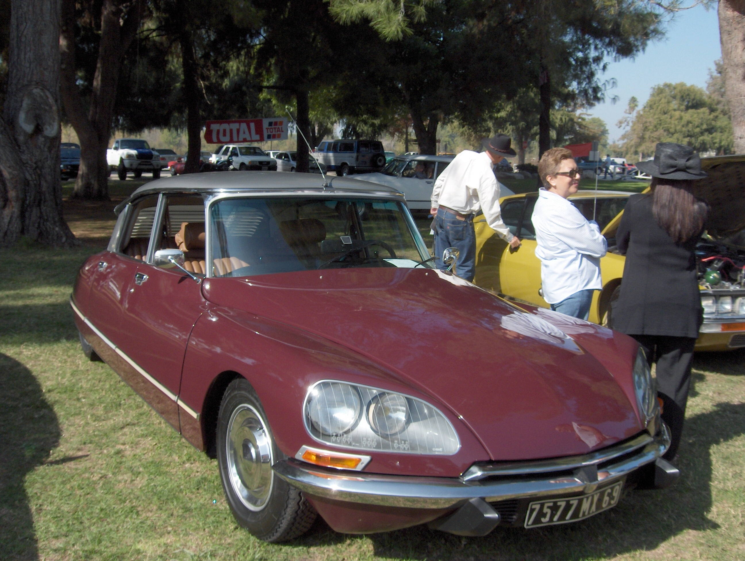 I took this photo in a public location. Mogge gasten, Wordt ook wel de 'snoek' genoemd, vanwege zijn vorm. Dit is Dawiet